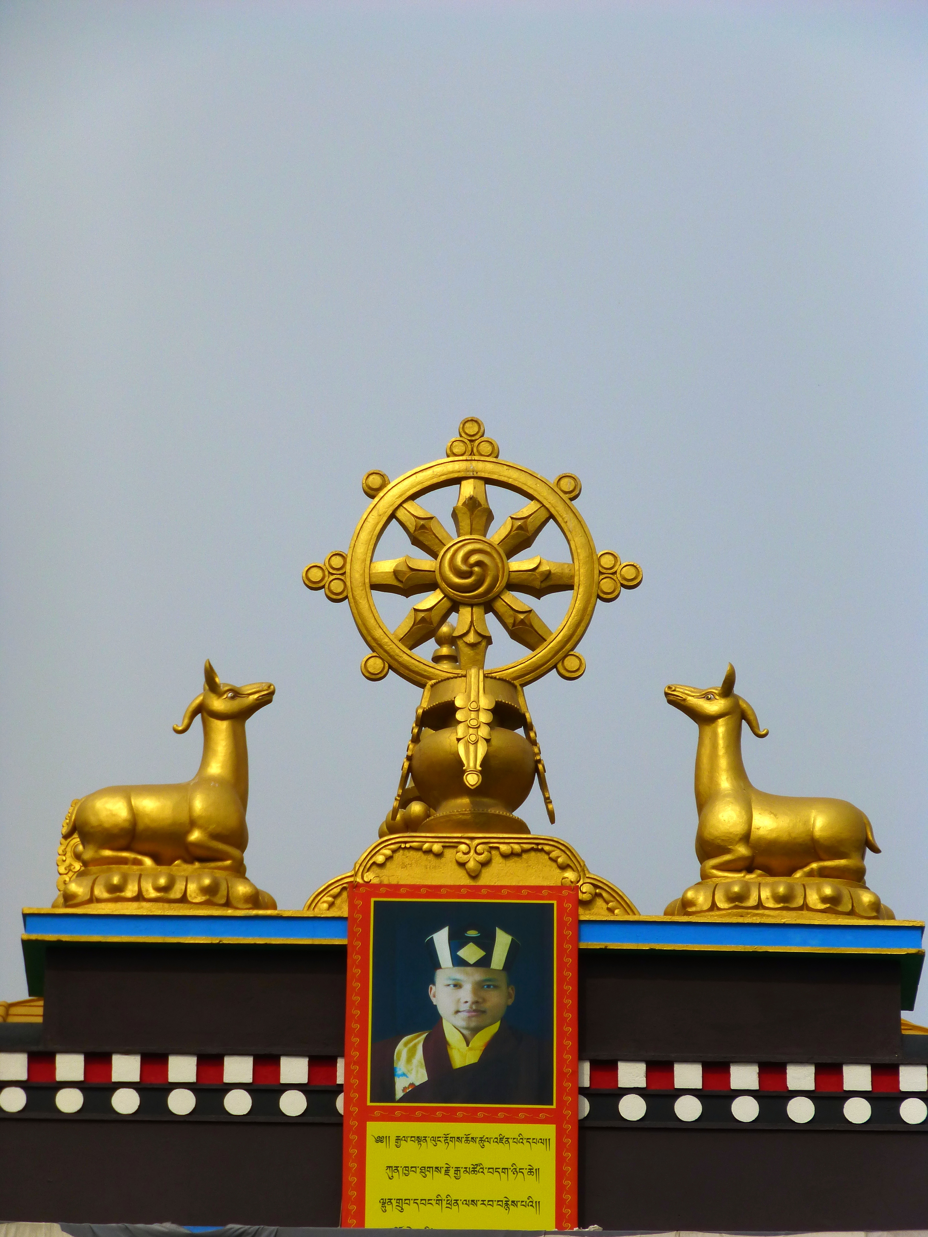 06 Dhammacakra and the Karmapa, Tibetan Temple, Bodhgaya